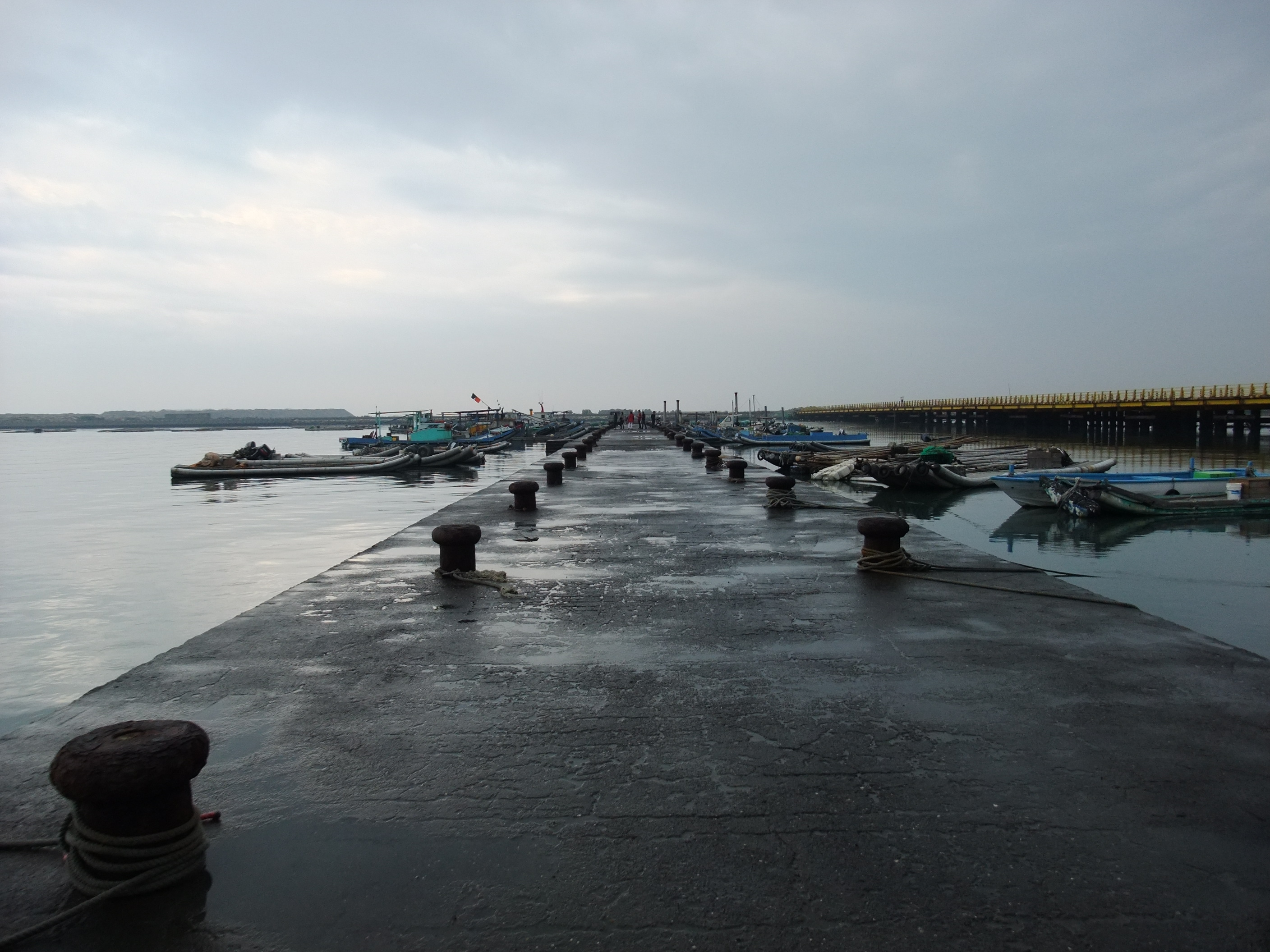 五條港漁港